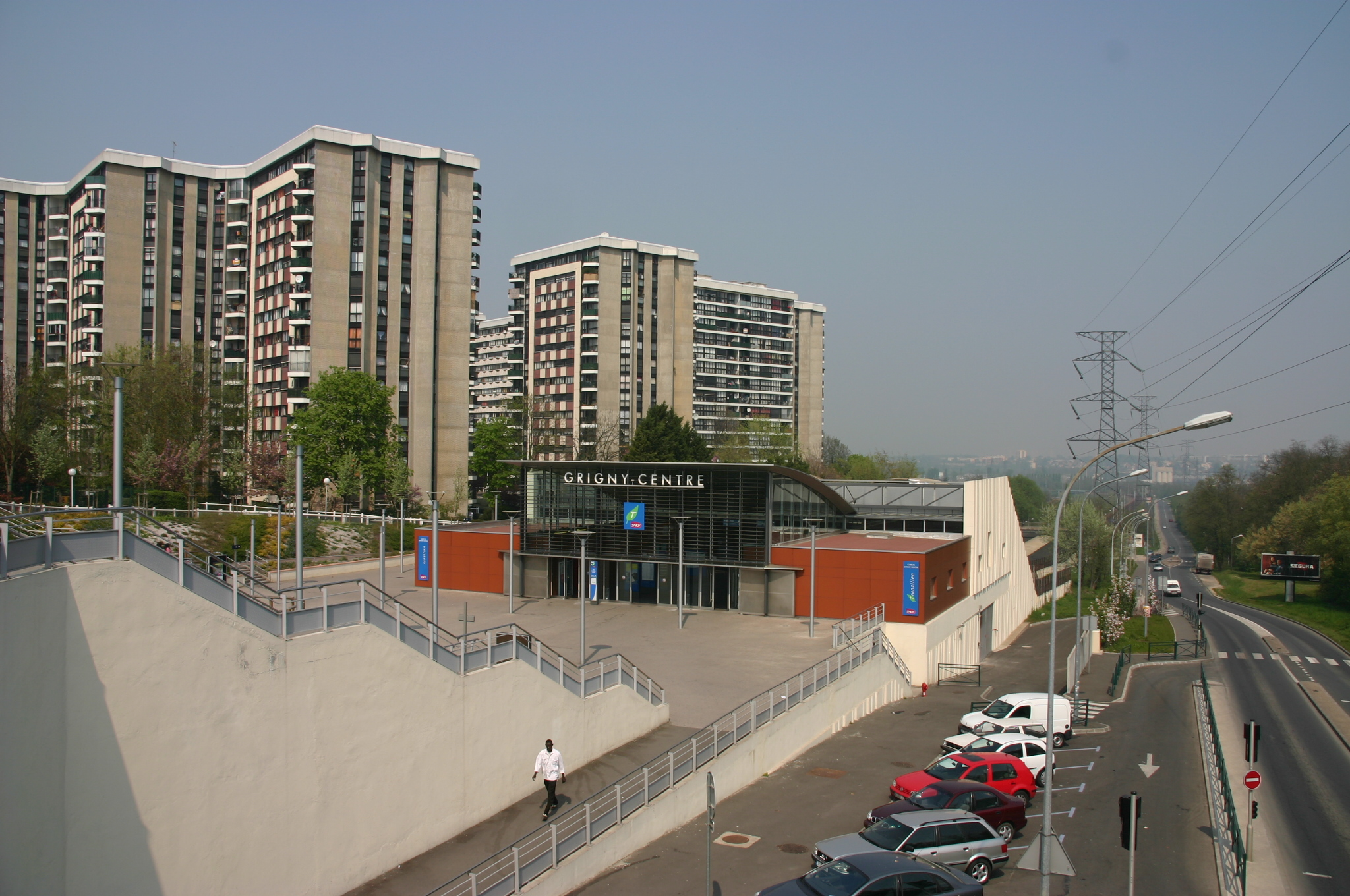 La Gare de Grigny-Centre , Grigny, département de l'Essonne, France